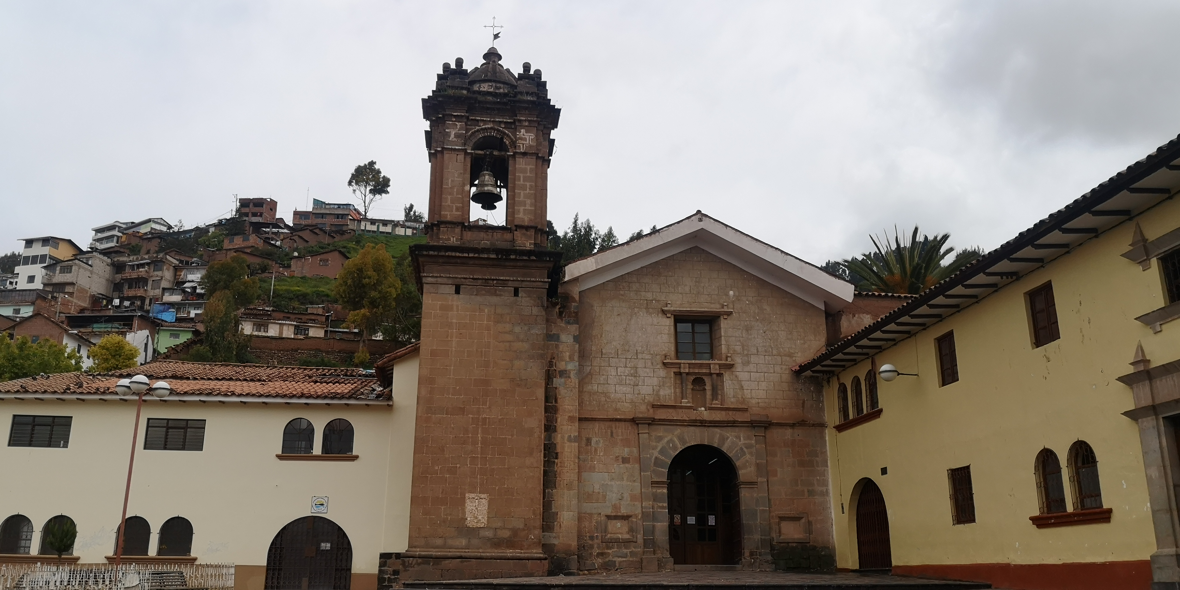 Vista de la iglesia y el convento de la Recoleta en el Cusco, Perú